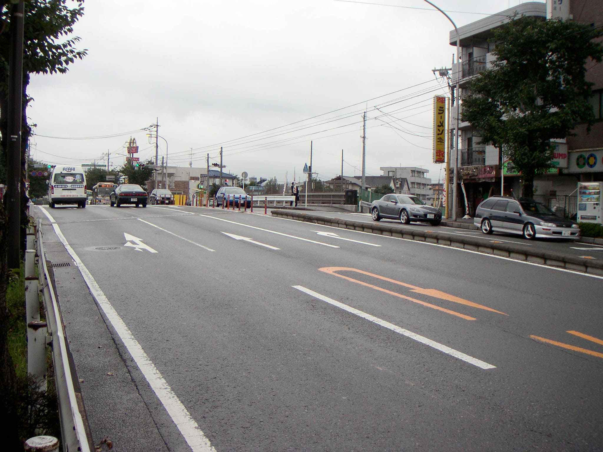 Loop 4, Yokohama, Kanagawa; near Tokaichiba Station, JR